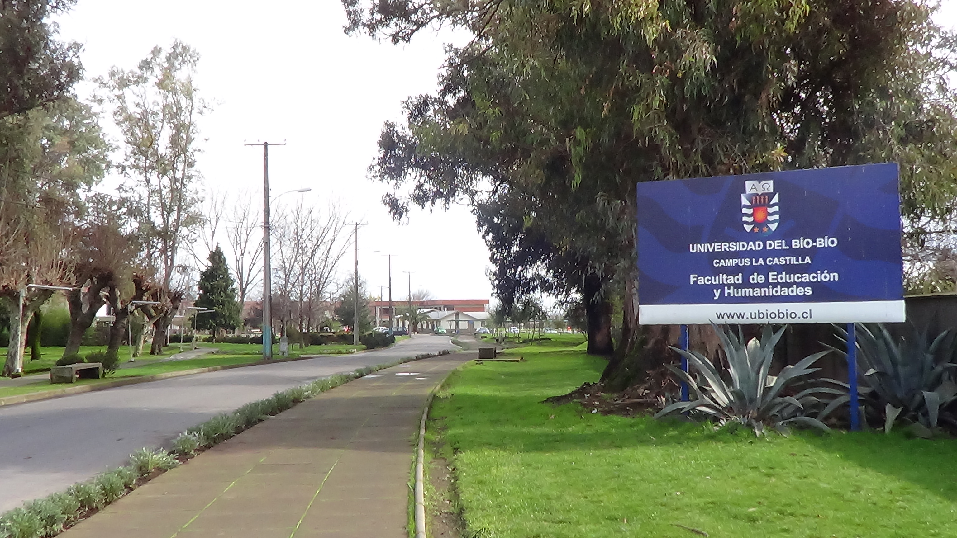 Entrada al Campus La Castilla de la Universidad del Bío-Bío de Chillán, por Avenida Brasil.